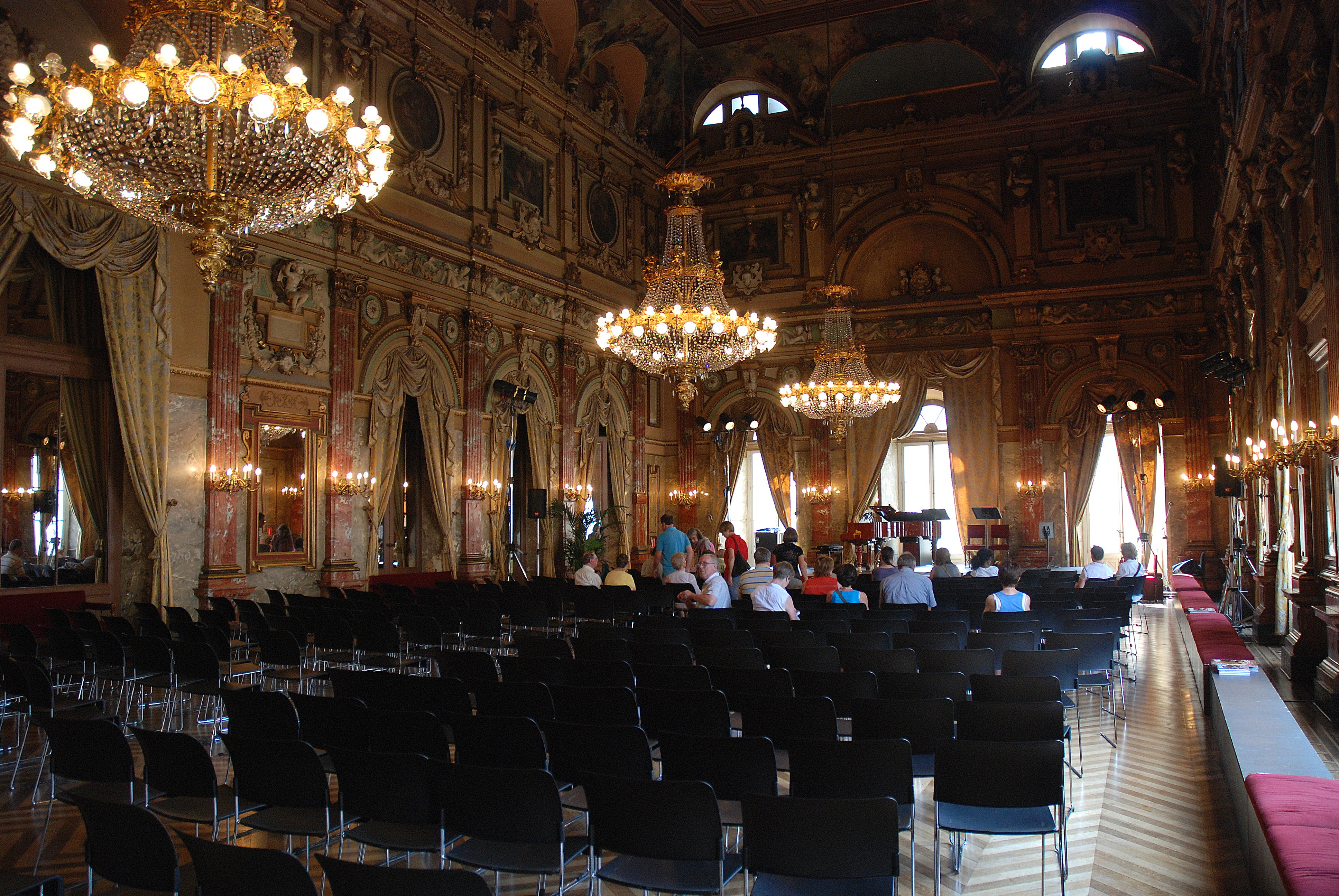 de Lullyzaal van de Vlaamse opera te Gent